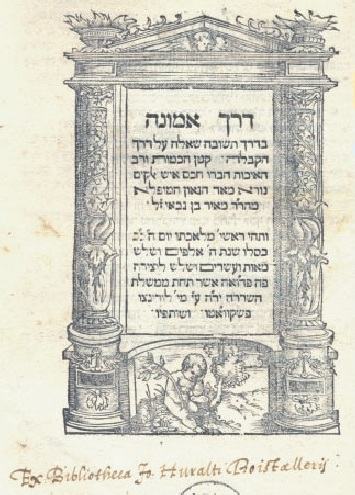 hebrajski rękopis, w 1562 roku nabył go Jean Hurault